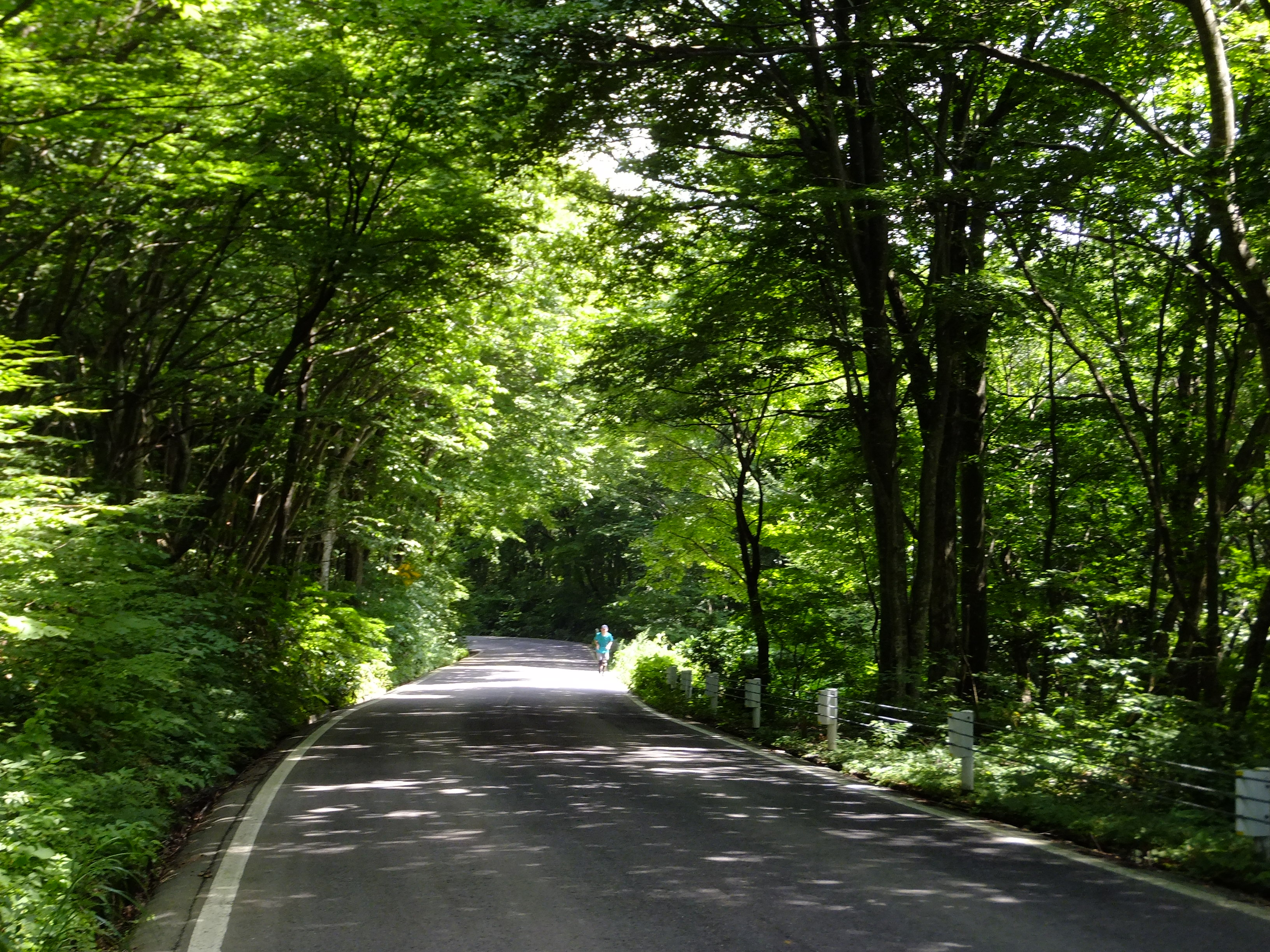 秋田県道60号田沢湖畔線。湖畔を反時計回りに走行した場合、たつこ茶屋を過ぎたあたりから急激な登り坂となる。標高差約50mを一気に登る田沢湖マラソン最大の難関。